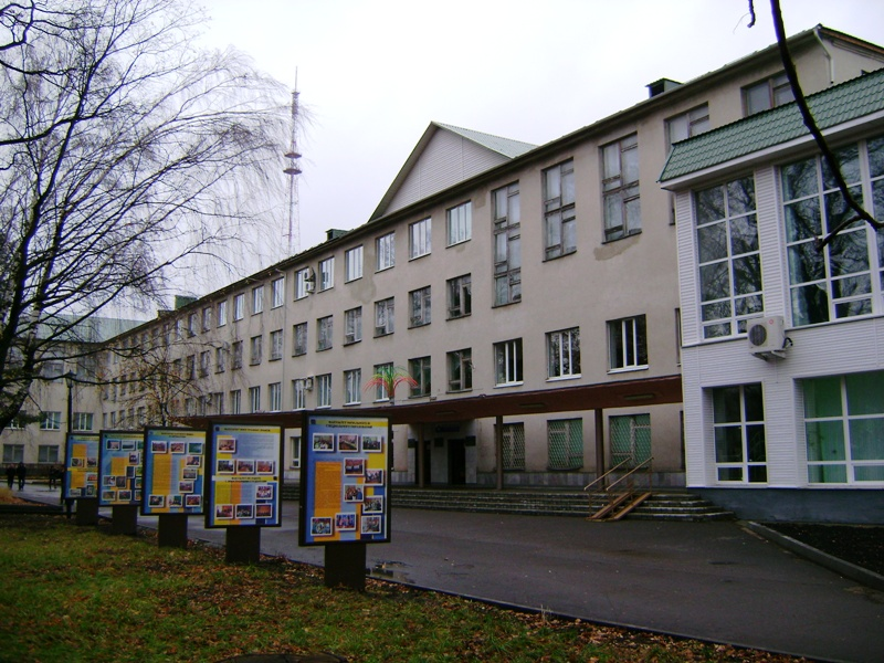 Hauptgebäude der W.-G.-Belinsiki Universität Pensa